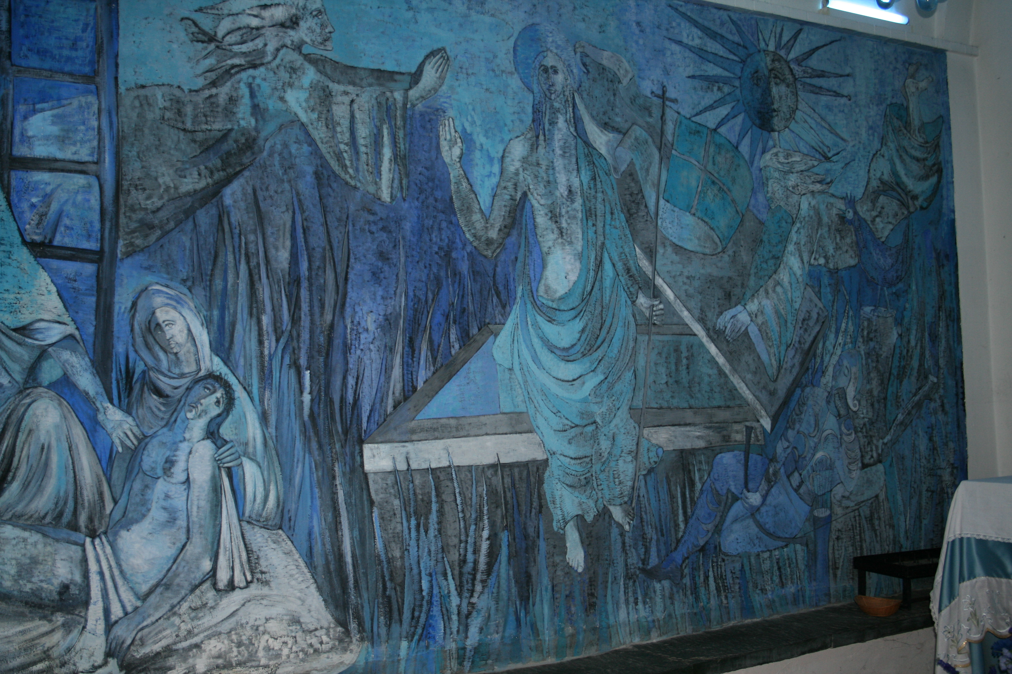 Ponce de Léon, La Chapelle Bleue, Coaraze, Alpes-Maritimes, France, La Résurrection (fresques de 1962)